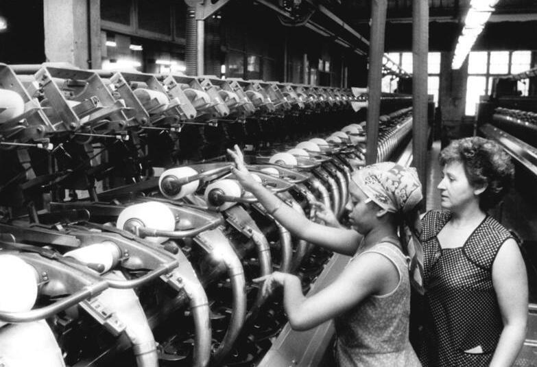 Niederschmalkalden, kubanische Gastarbeiterin ADN-ZB Schaar 23.9.87 Bez. Suhl: Wettbewerb-Um hohe Wettbewerbsergebnisse ringen die Werktätigen des VEB Kammgarnspinnerrei Niederschmalkalden. Seit 24 Jahren können sie mit erfüllten und überfüllten Plänen aufwarten. Zu den 80 Kubanerinnen, die in dem Betrieb tätig sind, gehört auch Graziella Sagorra. Sie arbeitet an modernen Spülautomaten, hier mit Schichtmeisterin Rosel Hohmann.